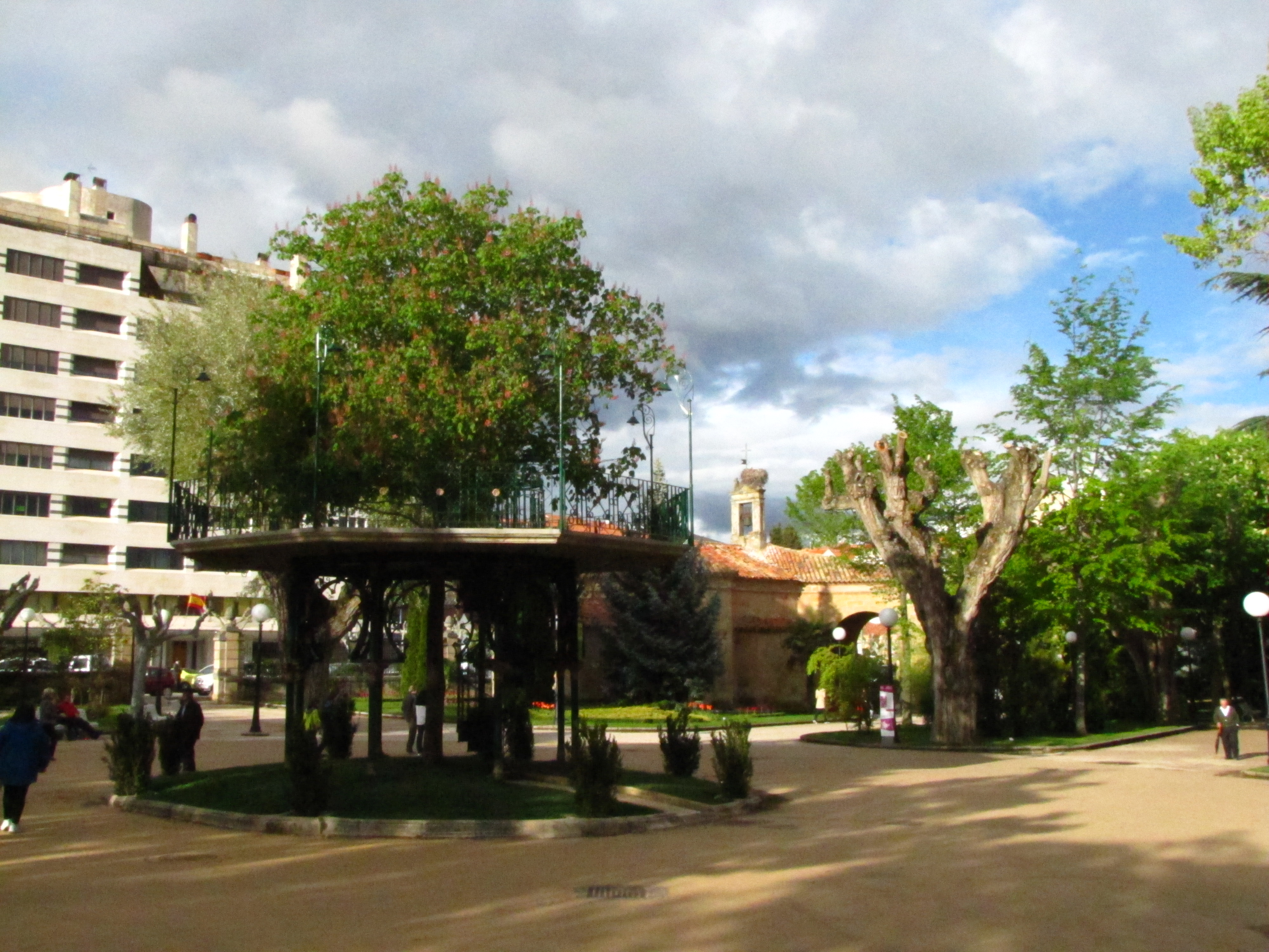 Árbol de la Música. Alameda de Cervantes (Soria).